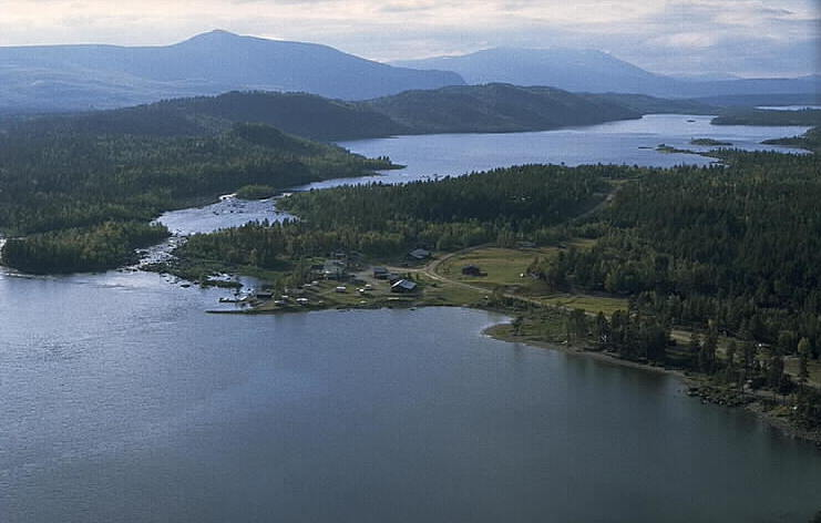 Laisälven Motiv: Gávtto (Gauto) Nyckelord: Flygbilder, Riksintressen Kategori: Fjällbygd Laisälven.